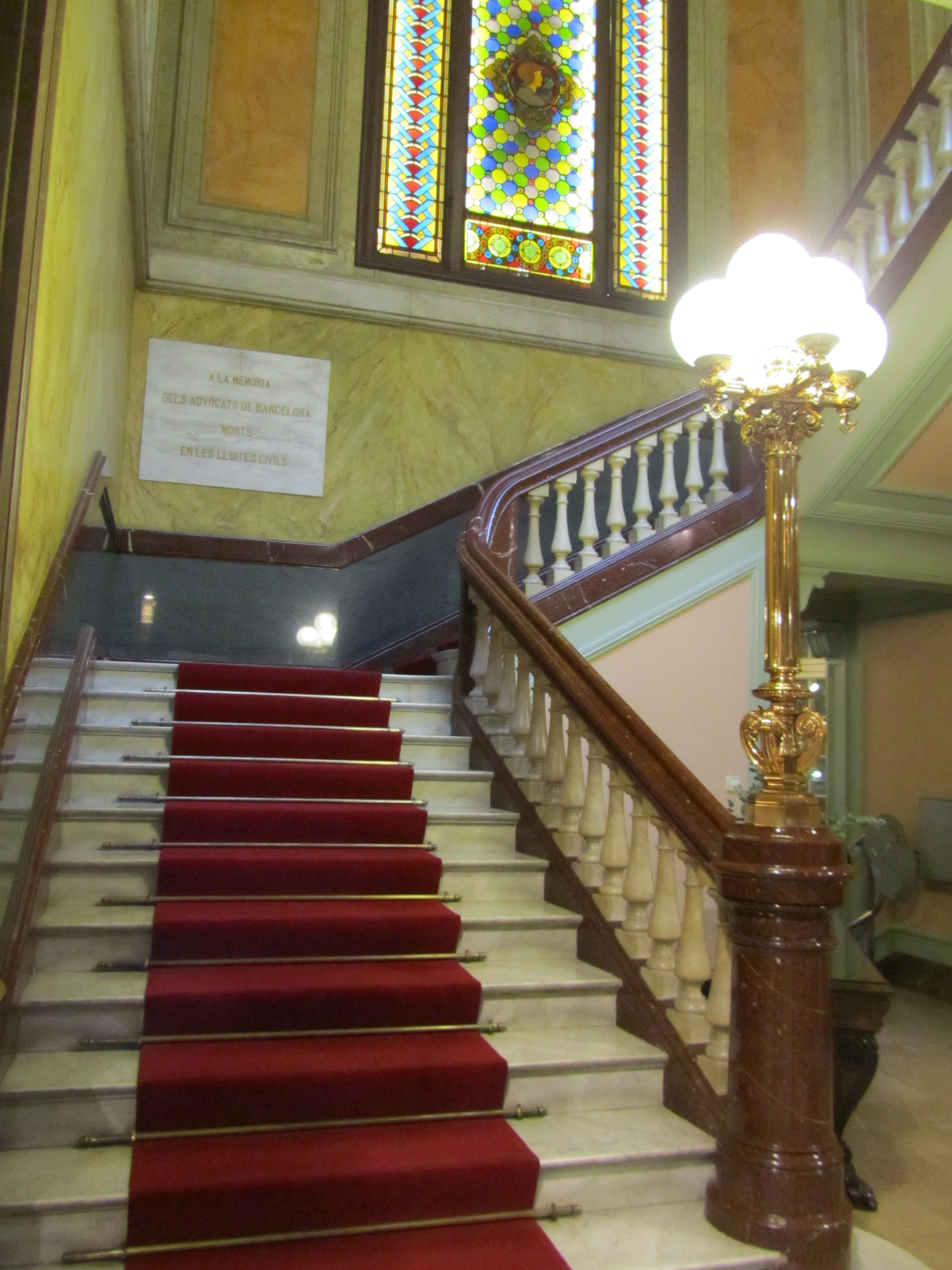 Escala del Palau Casades